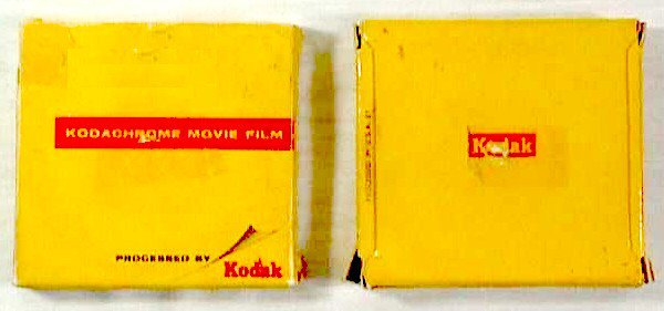 Película de 8 mm marca Kodak